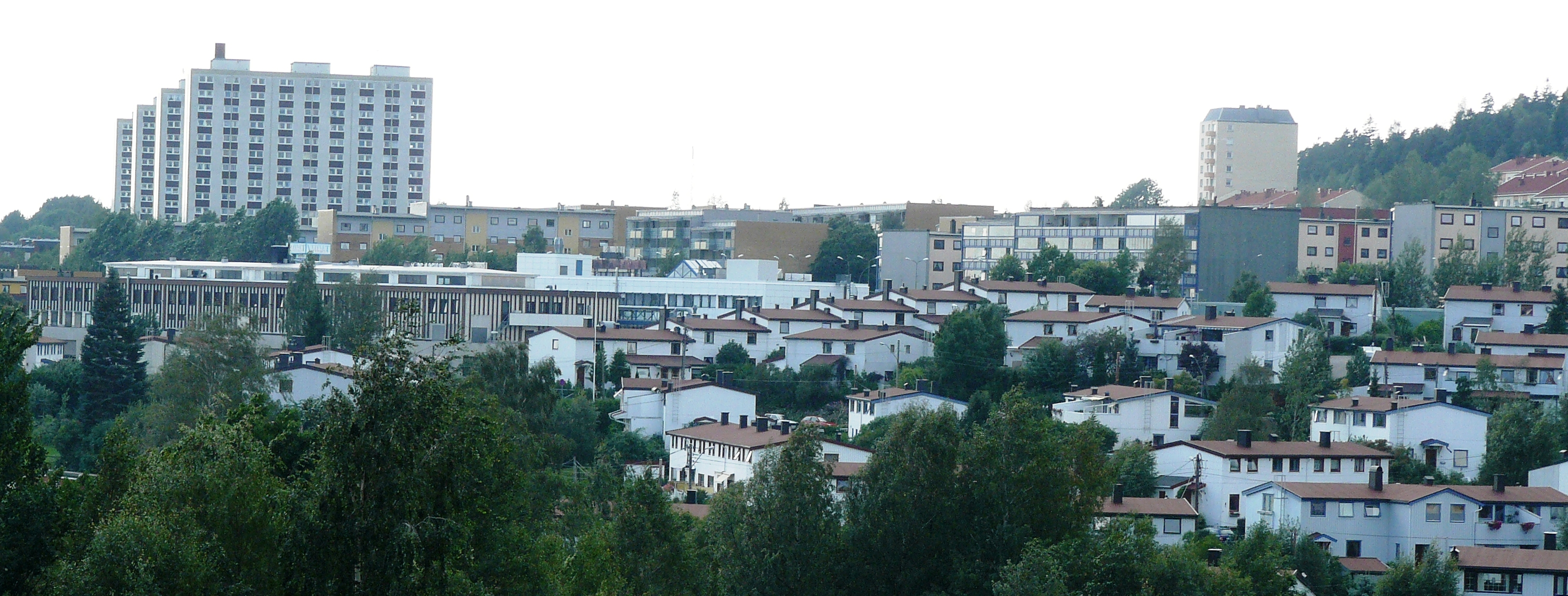 Bydel Bjerke, with Linderud & Veitvet viewed from Kalbakken, Oslo